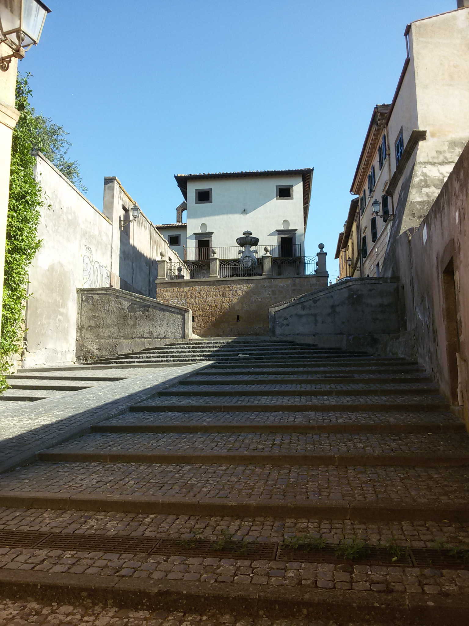 Scalinata e palazzo Donnini, ex episcopio di Tuscania